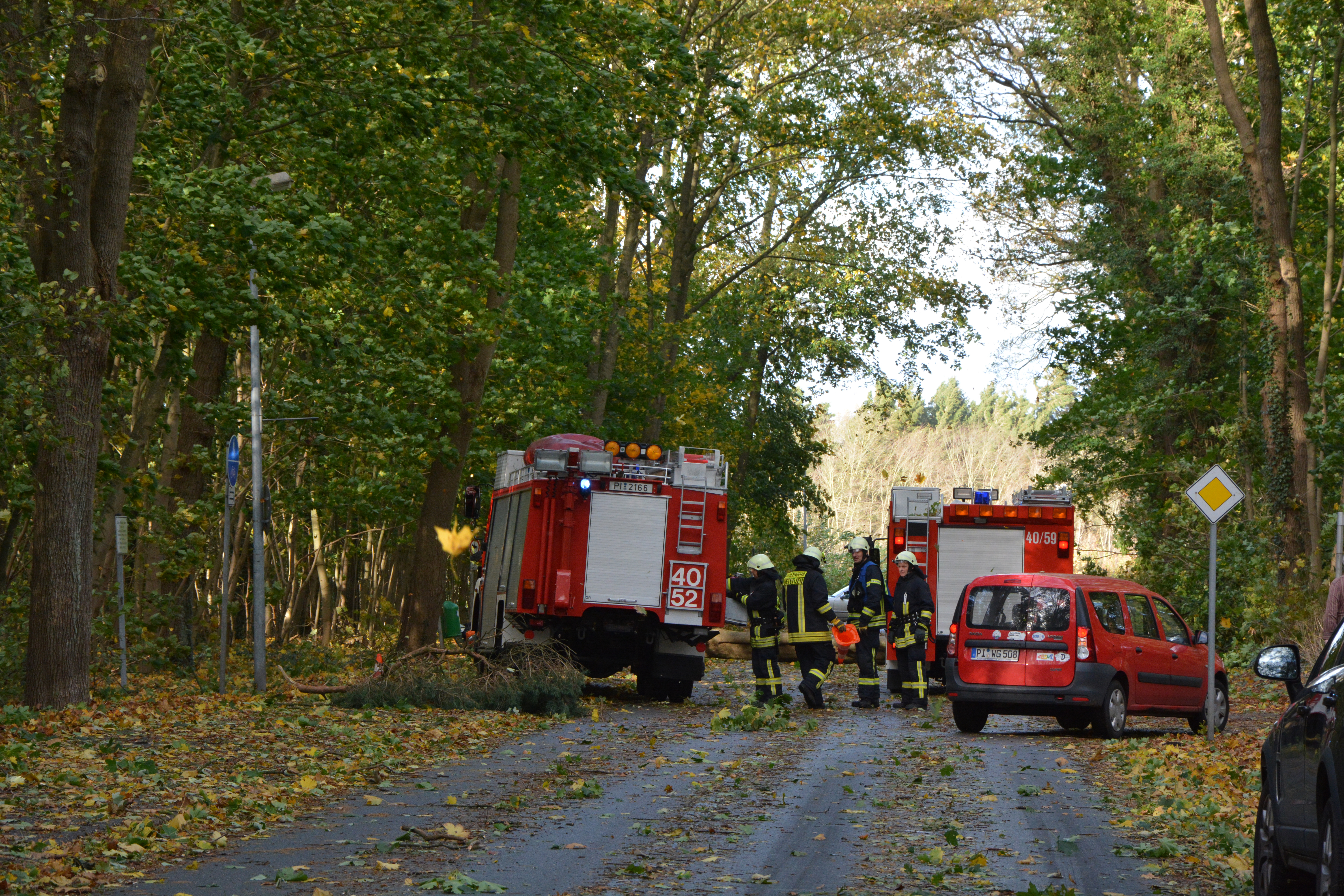 Umgestürze Bäume in Uetersen während des Orkans Christian